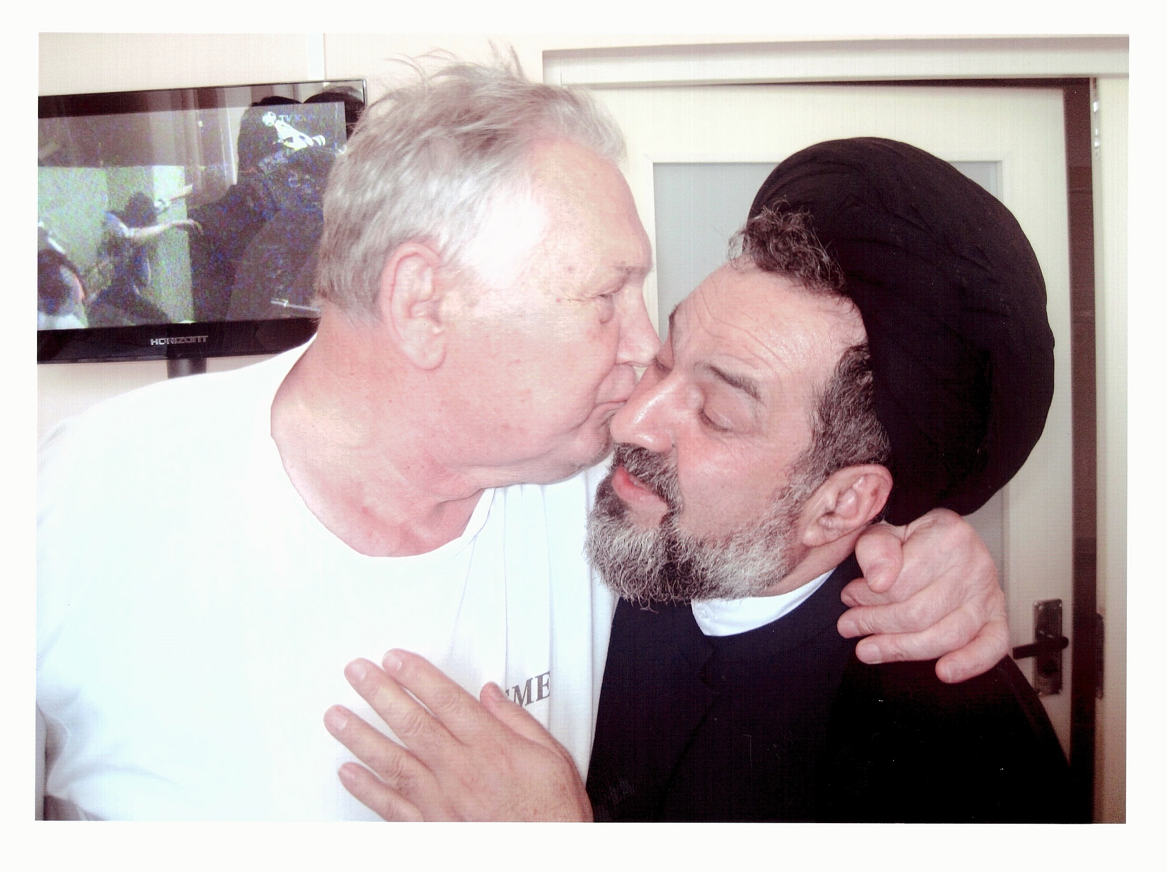 عیادت حجت الاسلام سید حبیب الله حسنی از الکساندر واسیلیویچ مدوید حریف جهان پهلوان تختی در بیمارستانی در بلاروس . در این دیدار مدوید برخورد بسیار گرم و دوستانه ای با حجت الاسلام حسنی داشته و از ایشان برای تدارک این ملاقات تشکر کردند .